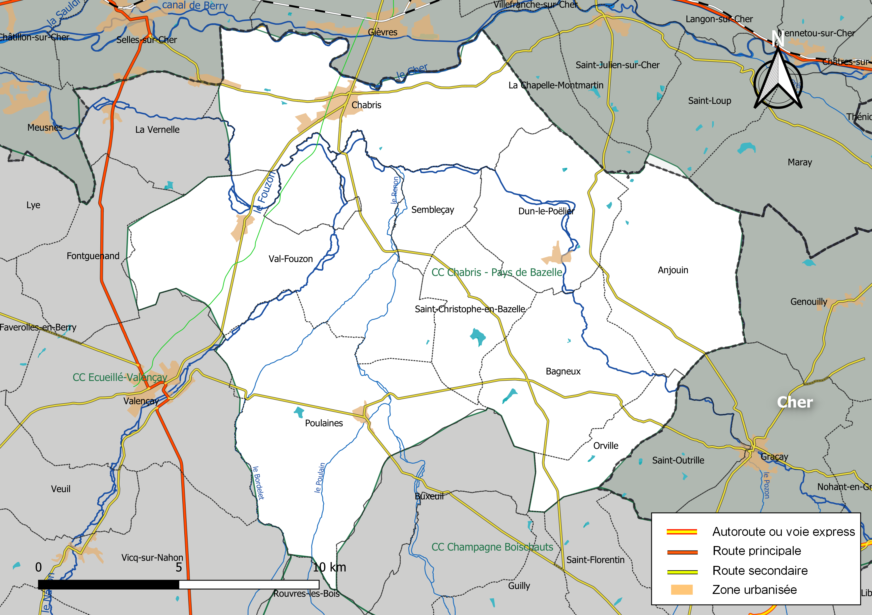 Carte de la communauté de communes Chabris - Pays de Bazelle, département de l'Indre, France. Composition au 1er janvier 2019.